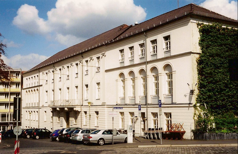 Arnoldsche Tapetenfabrik, ~1810